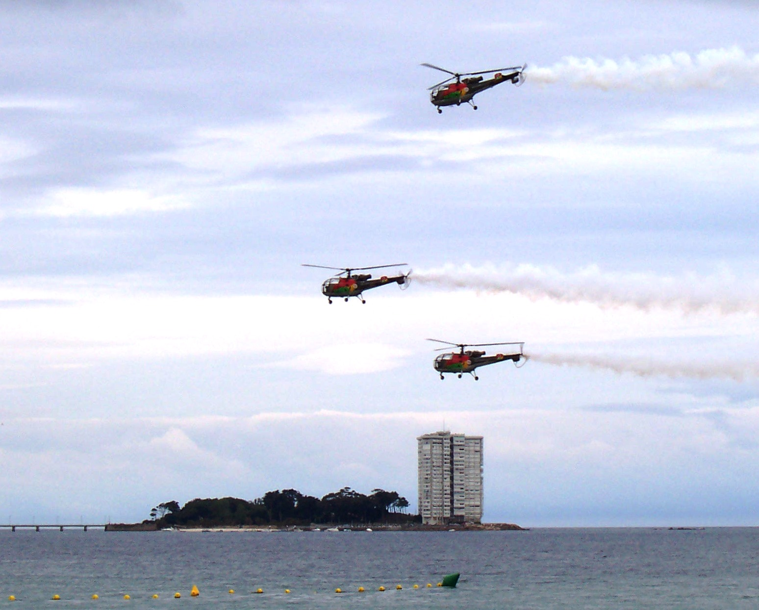 Patrulla acrobática Rotores de Portugal no Festival Aéreo Internacional de Vigo 2007, dende a praia de Samil, detrás a Illa de Toralla.